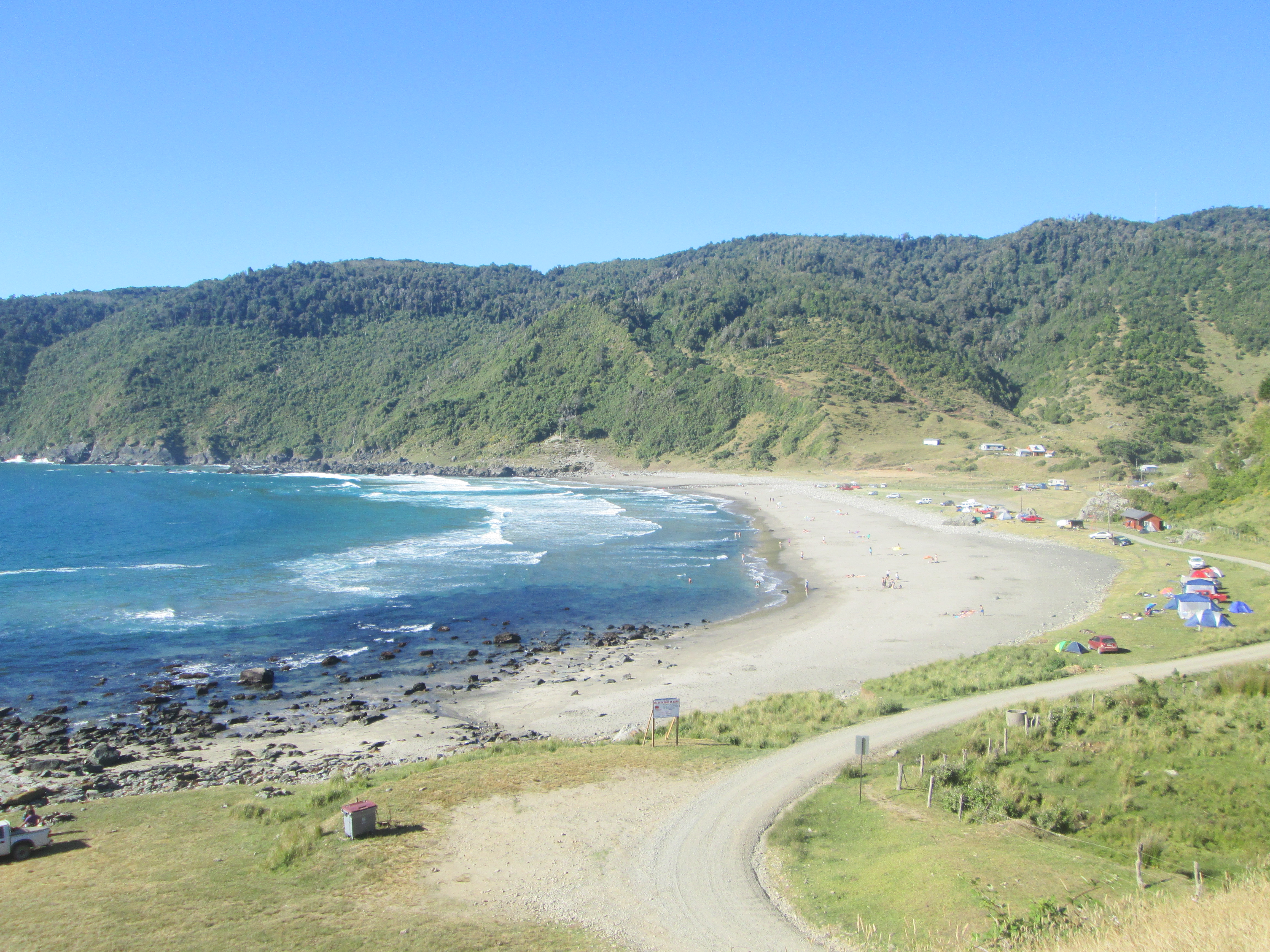 Algo para admirar. Pilolcura